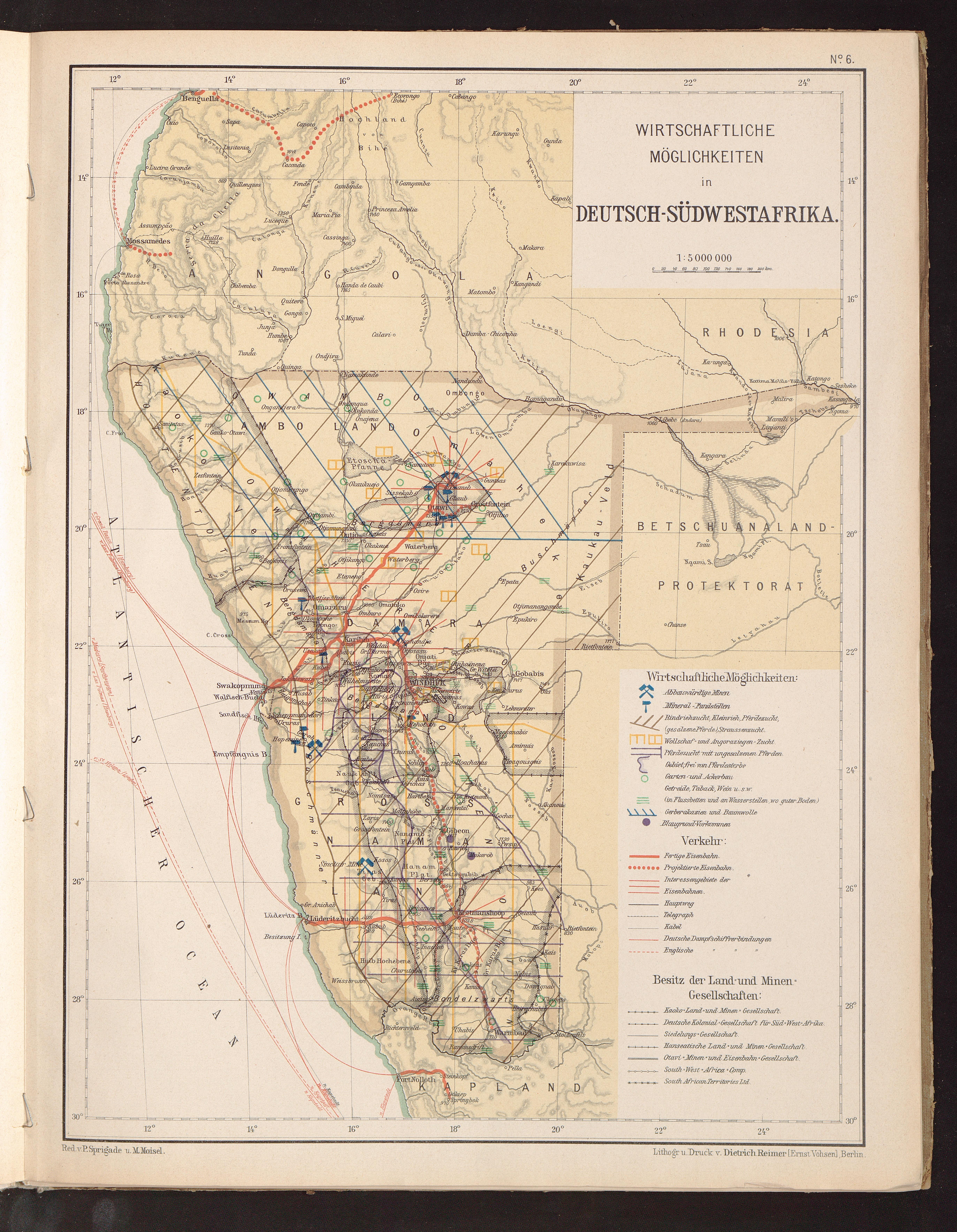 Wirtschaftsatlas der Deutschen Kolonien